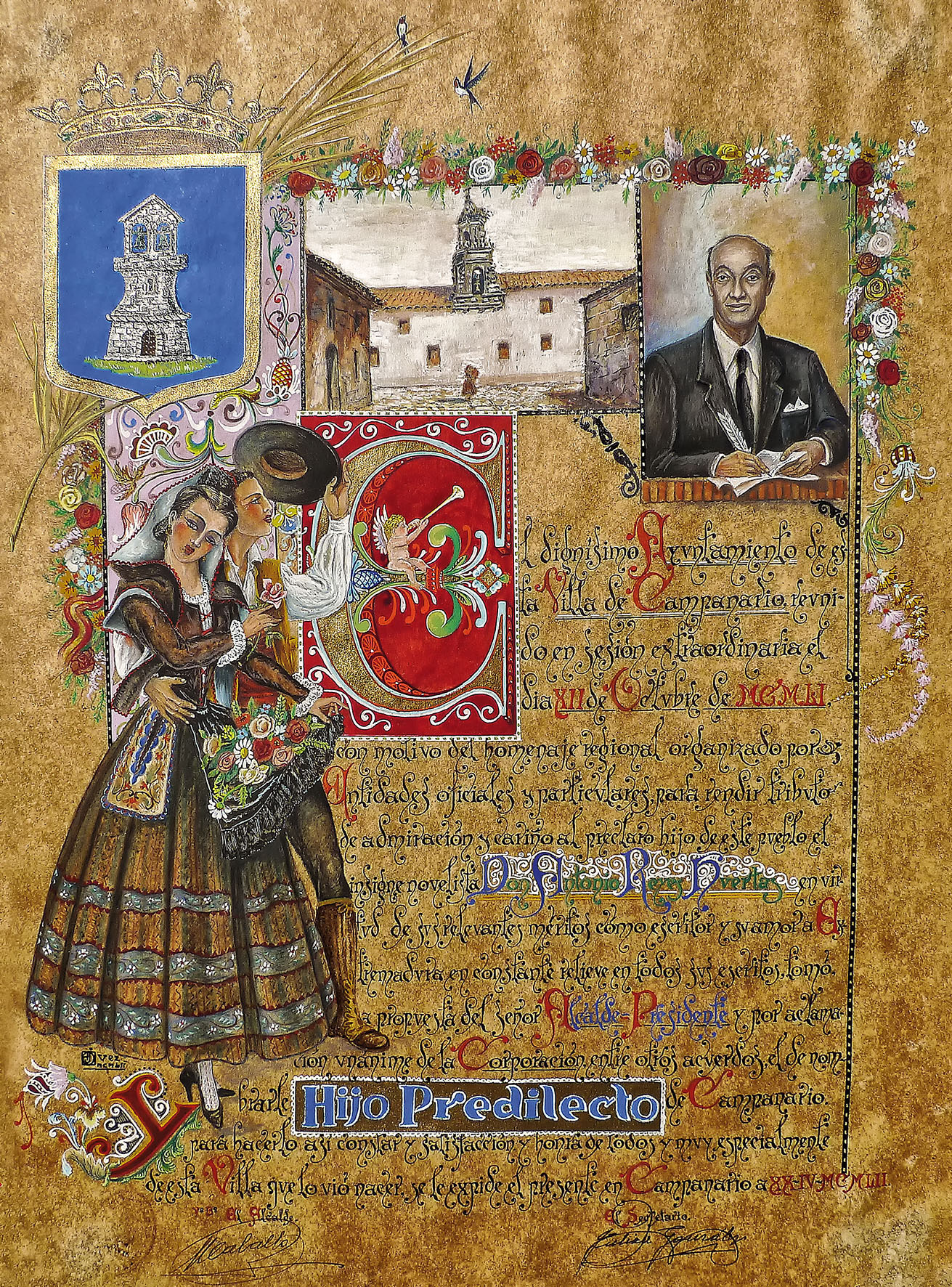 Diploma de Antonio Reyes Huertas como Hijo Predilecto de Campanario (Badajoz) - Extremadura (España).